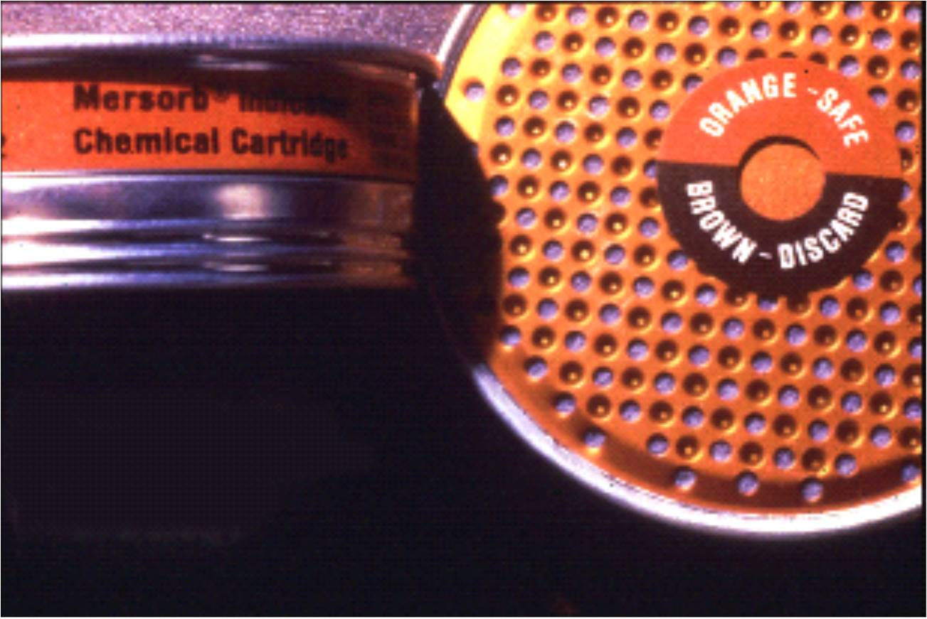 Индикатор окончания срока службы ESLI у фильтра, предназначенного для защиты от паров ртути